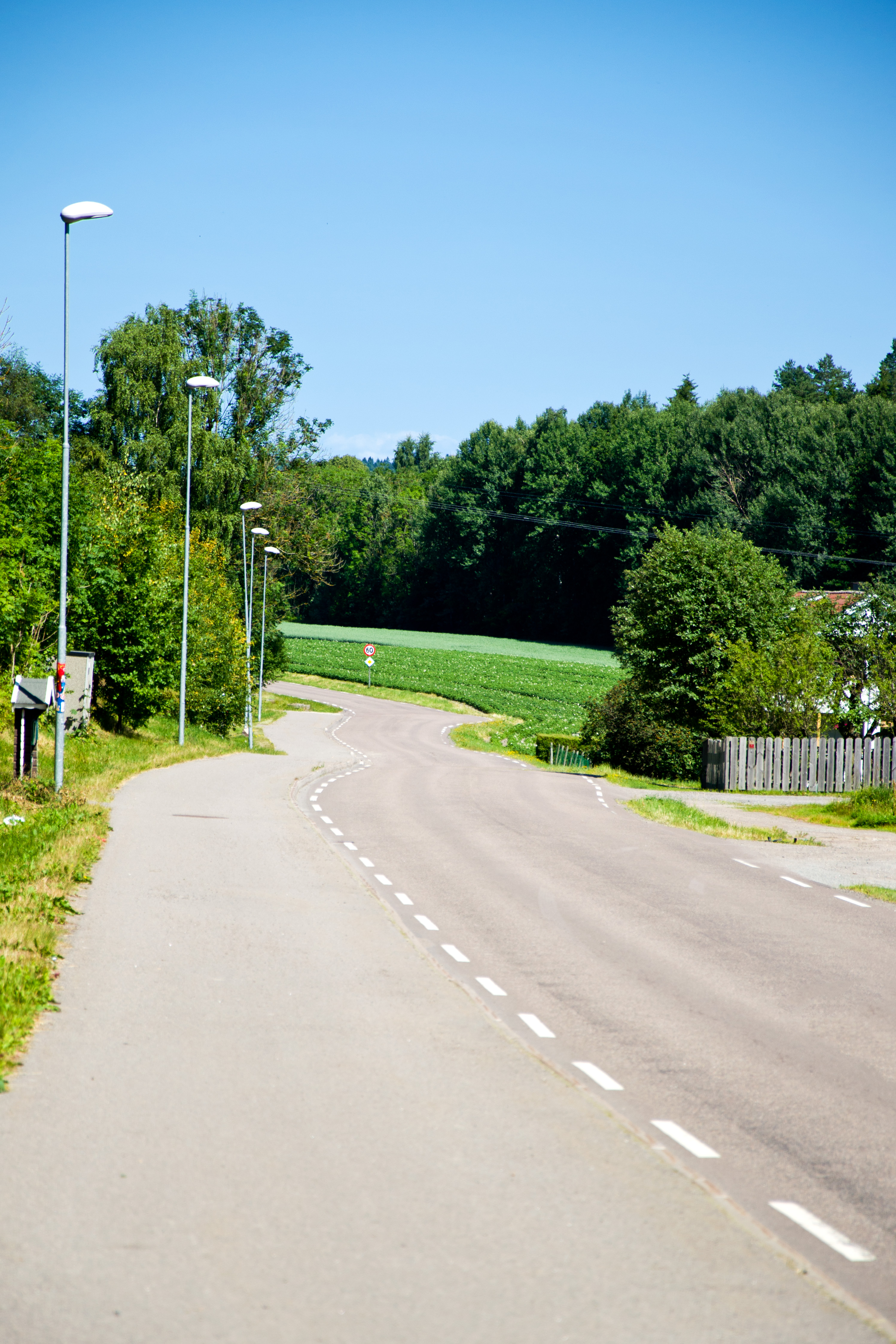 Fylkesvei 810 Brårveien i Re, Vestfold